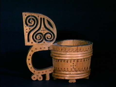 Smørstaup fra Sogn og Fjordane. Lengde 24 cm. Norsk Folkemuseum, NF.1894-0039.